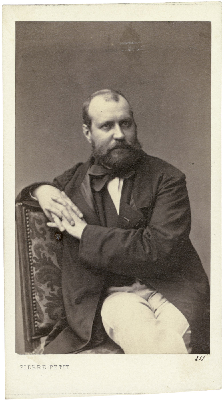 Charles Gounod. Albumen carte-de-visite print. Circa 10,5 x 6,5 cm.